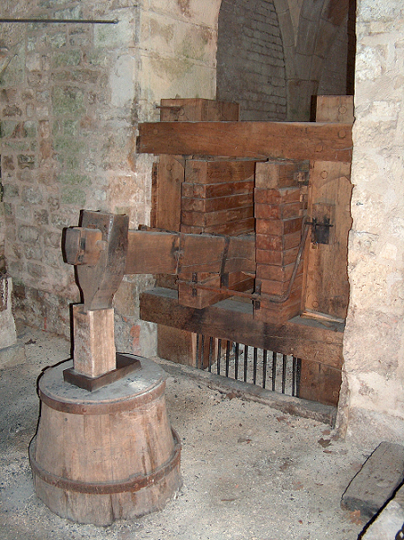 Abbaye de Fontenay .